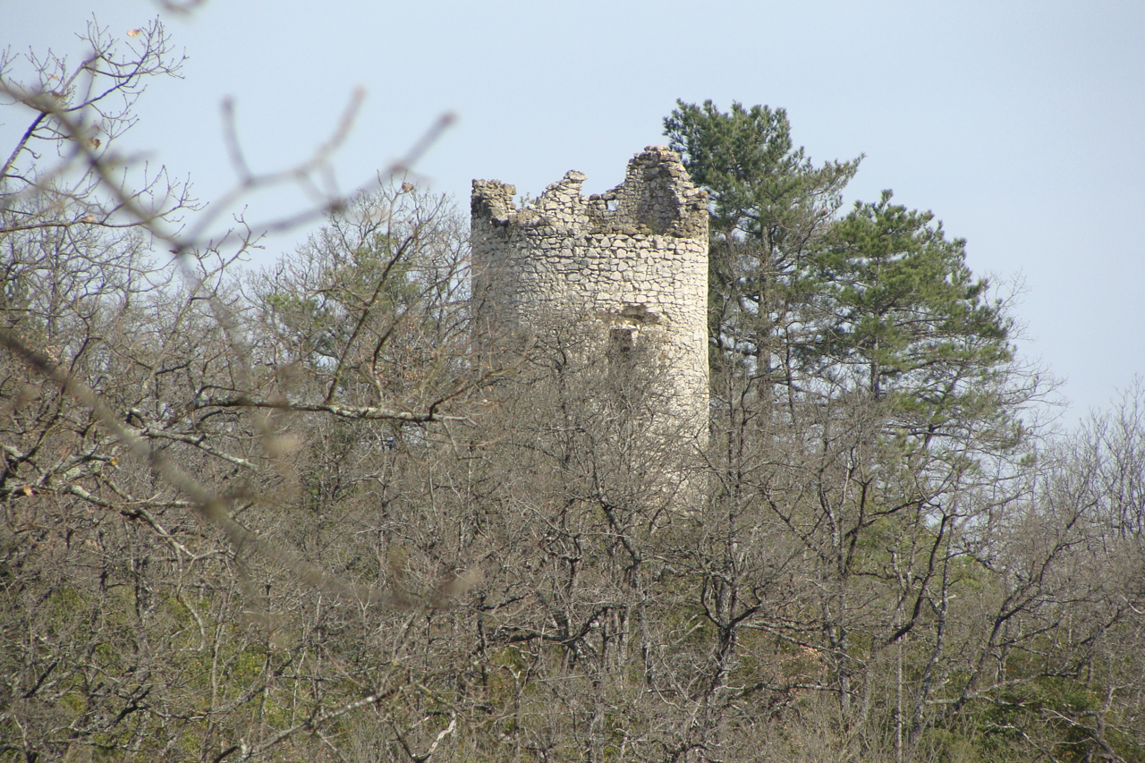 La tour des fées à Montégut (Gers, France).